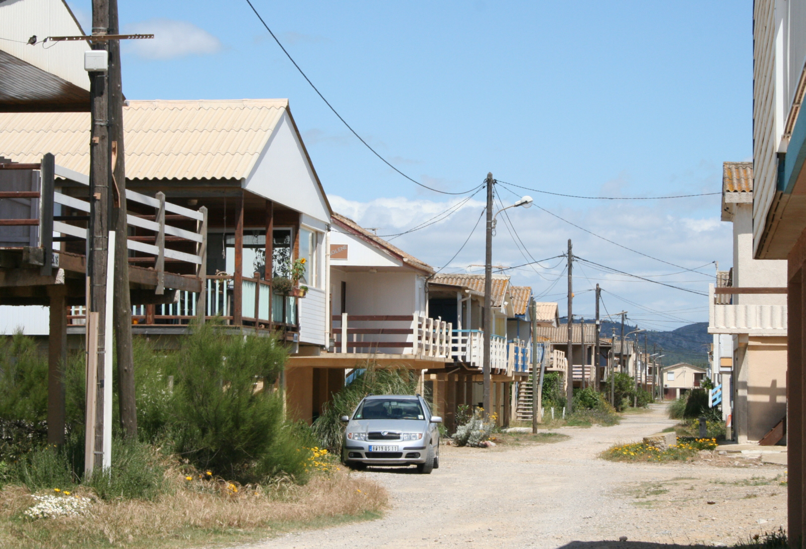 Gruissan 'pilotis'